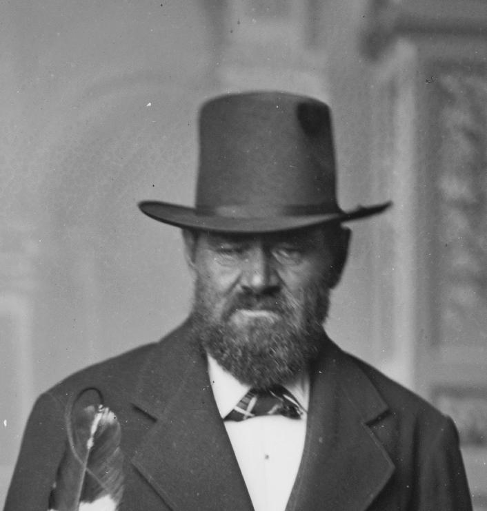 Antoine Janis, settler & fur trader.